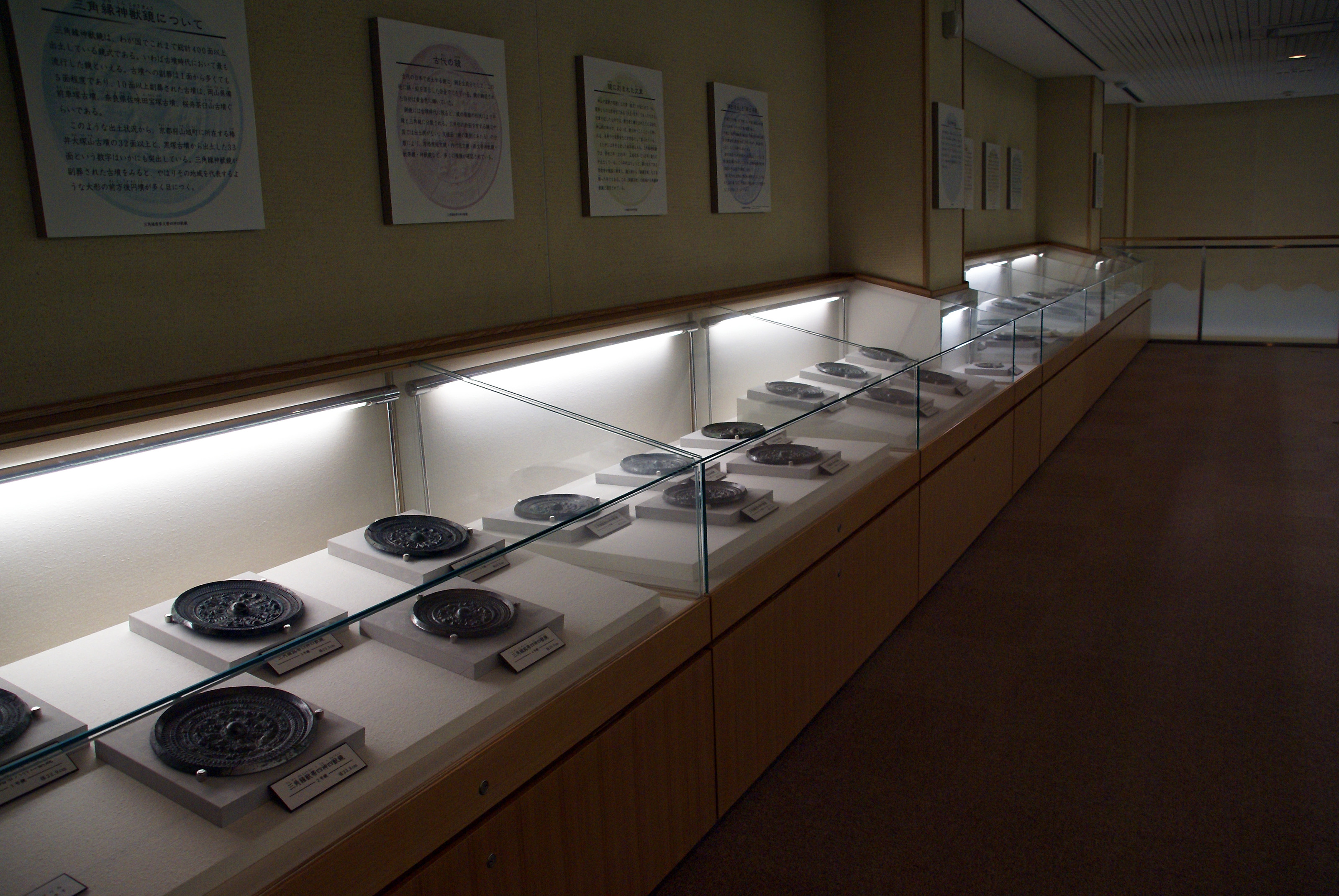 Tenri Municipal Kuroduka-kofun Museum in Tenri, Nara, Japan